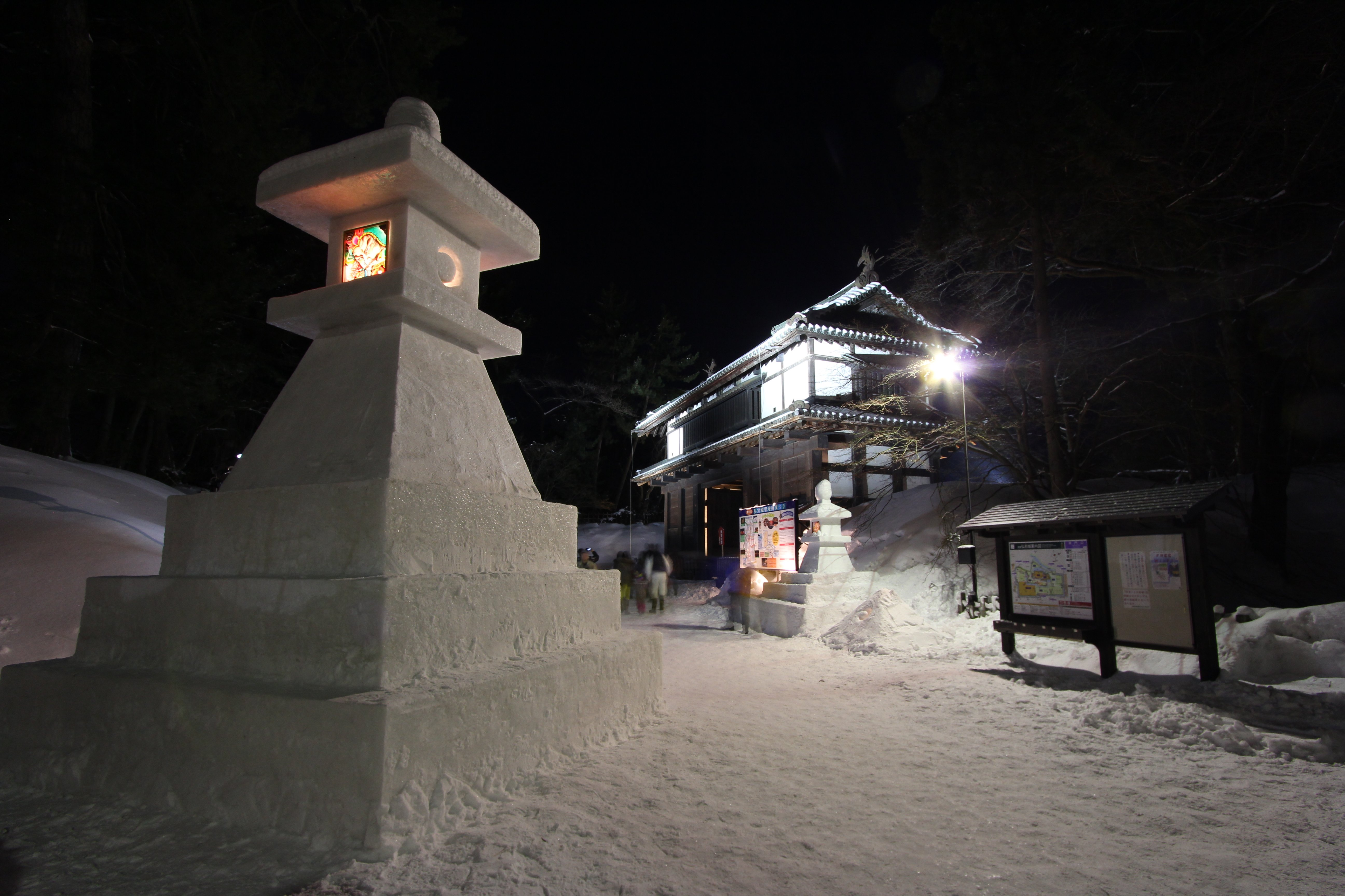 弘前城